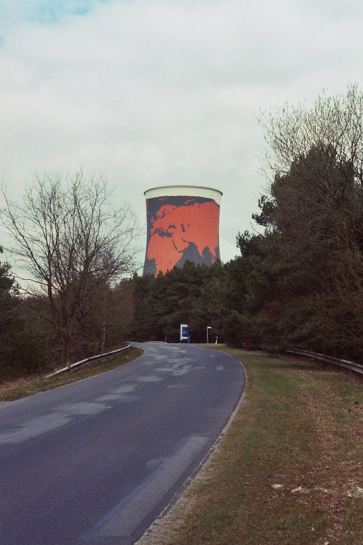 Emsland, Kühlturm des Kraftwerks Meppen-Hüntel